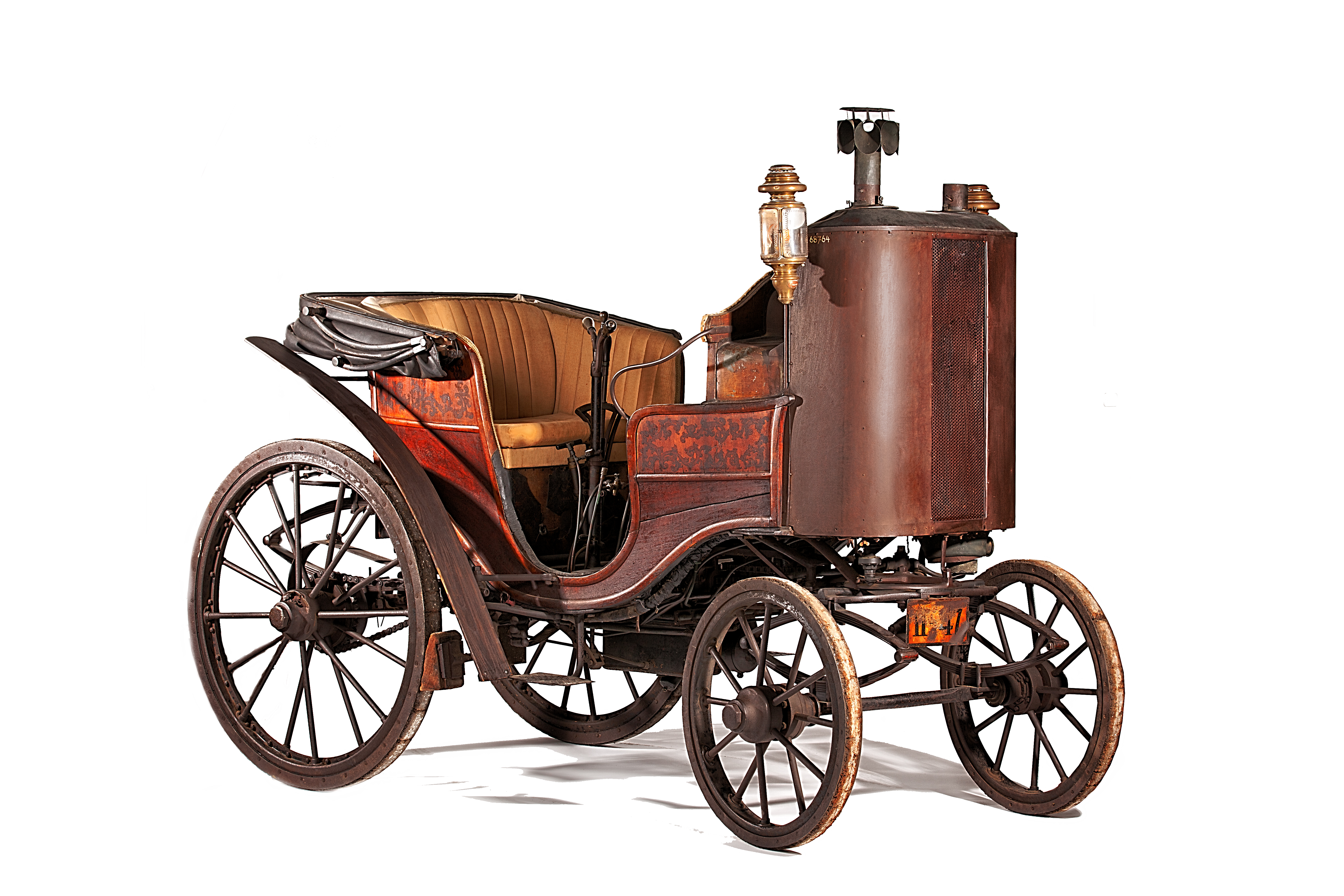 Leihgabe Deutsches Museum München // 1895 stellte der Dresdner Schmiedemeister Gustav Adolf Schöche selbst entwickelten Dampfwagen fertig. Es ist das älteste Dresdner Automobil.